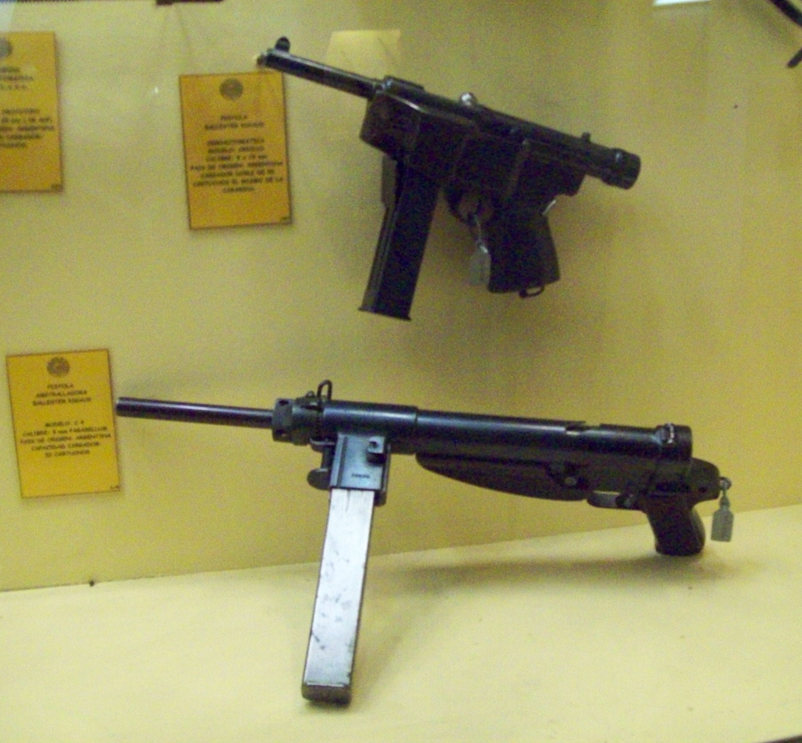 Armamento expuesto en el Museo de Armas de la Nación, ciudad de Buenos Aires, Argentina 2014.